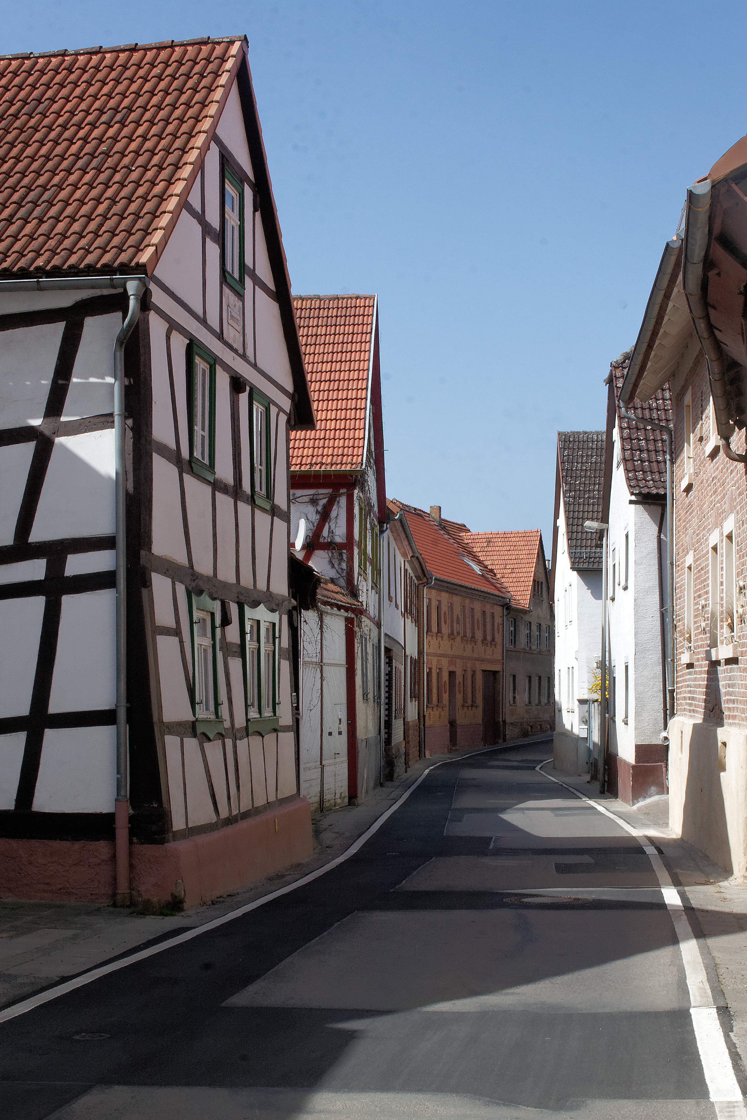 Die enge Hauptstraße von Radheim, einem Ortsteil der Gemeinde Schaafheim.